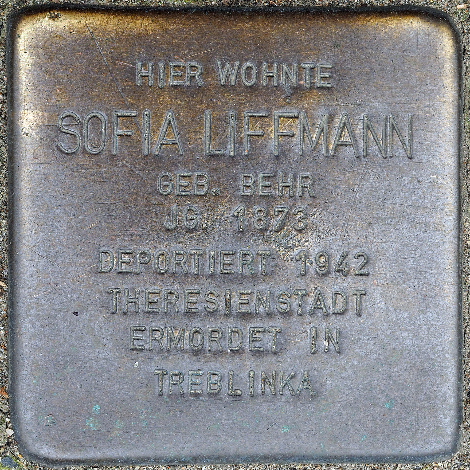 Stolpersteine MG: Liffmann, Sofia